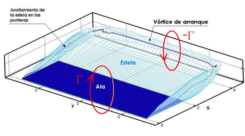 La foto muestra la aparición del vortice de arranque